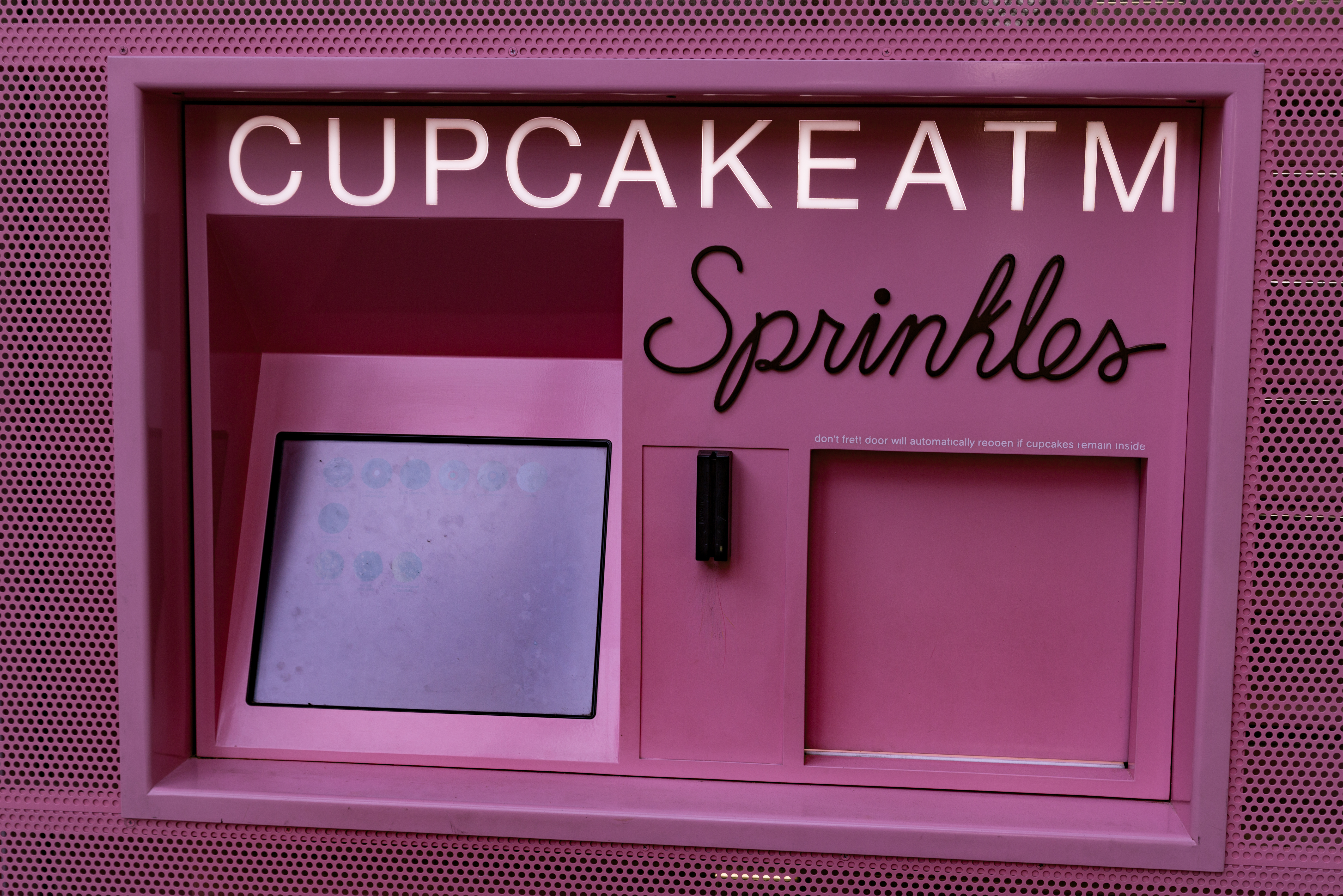 Las Vegas, Nevada